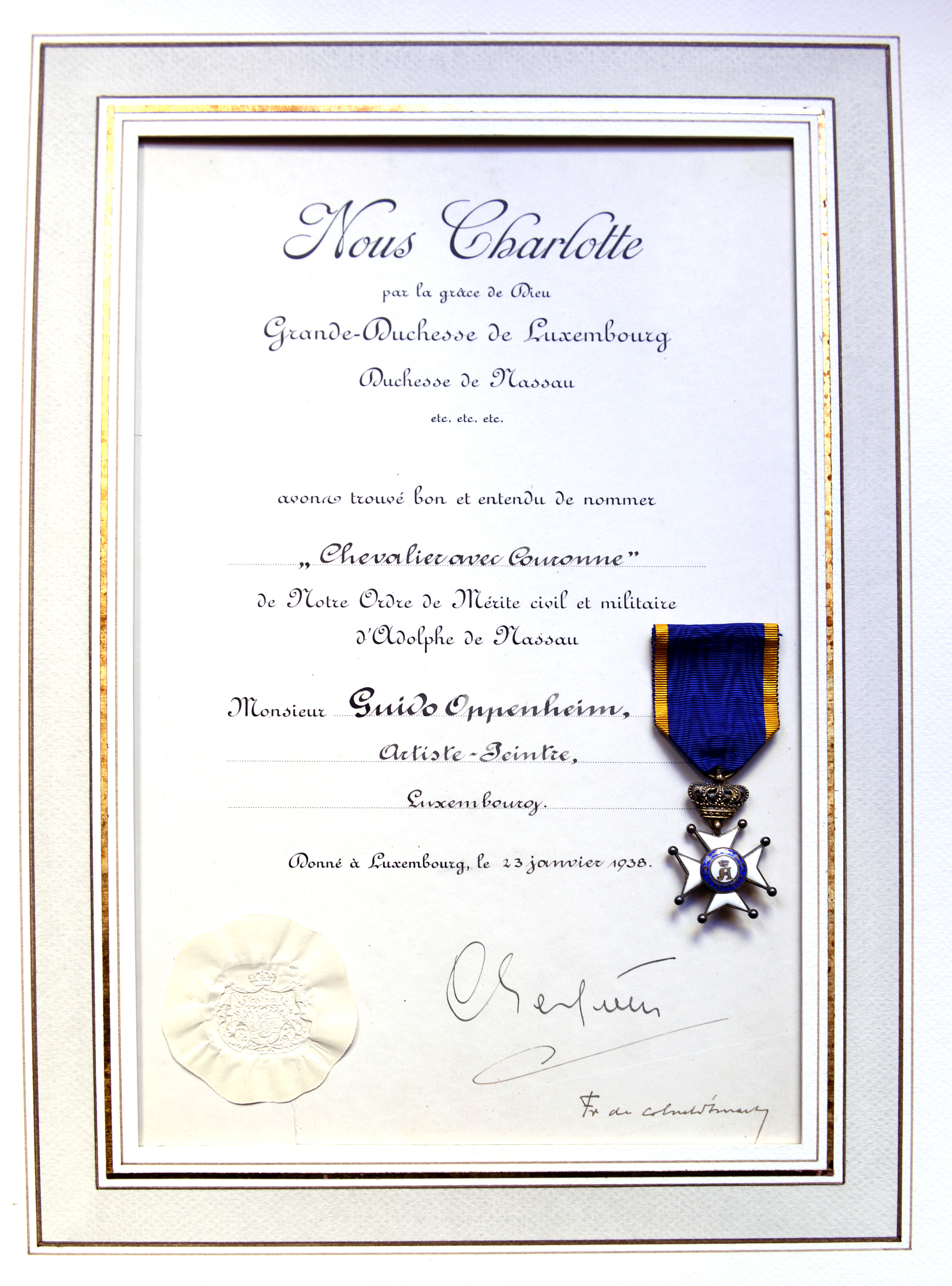 D'Nominatioun vum Guido Oppenheim zum "Chevalier avec couronne" de l'Ordre de Mérite civil et militaire d'Adolphe de Nassau, 23. Januar 1938.